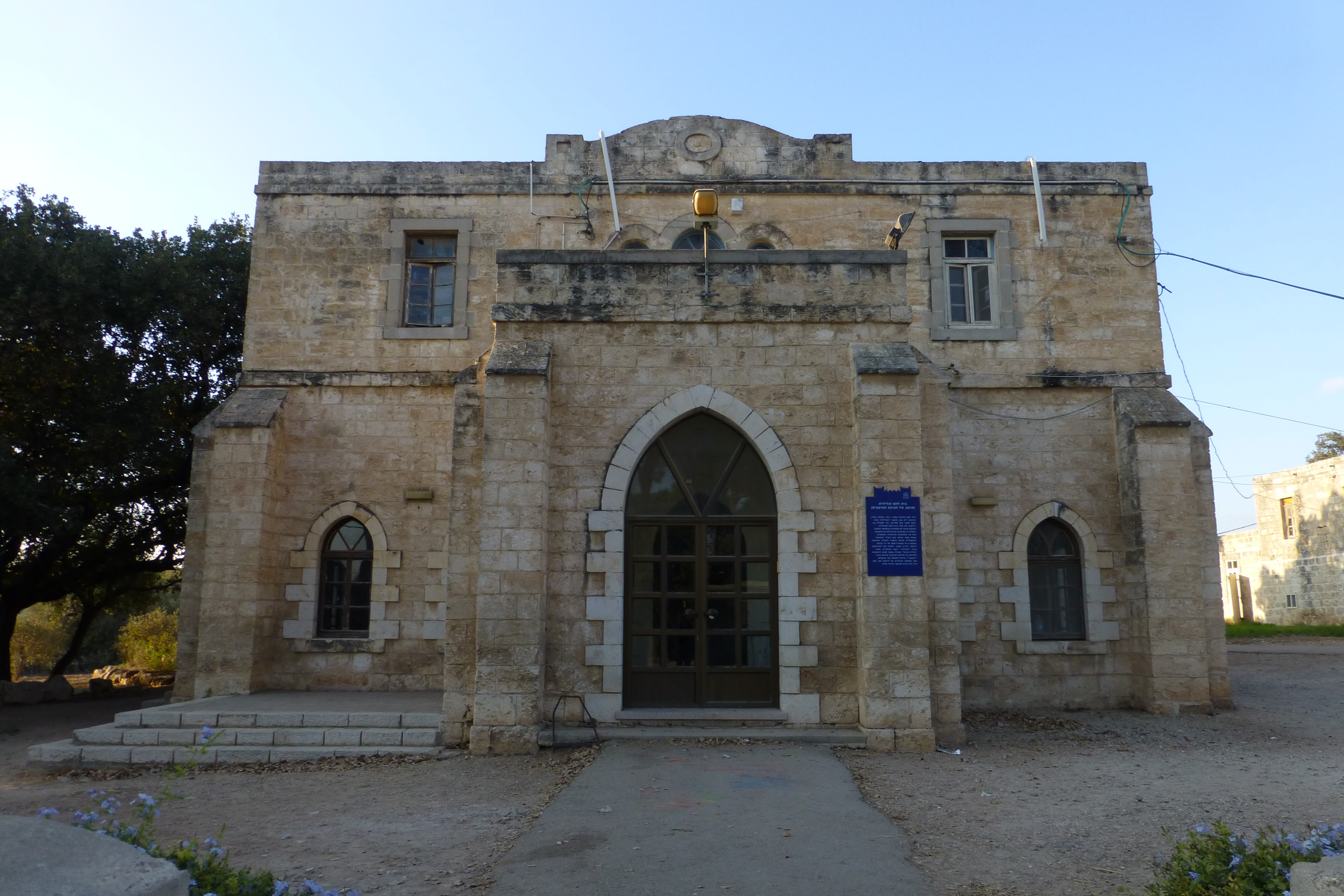 היישוב המודרני הראשון באיזור בית לחם הגלילית הוקם על ידי הטמפלרים ב-1906.